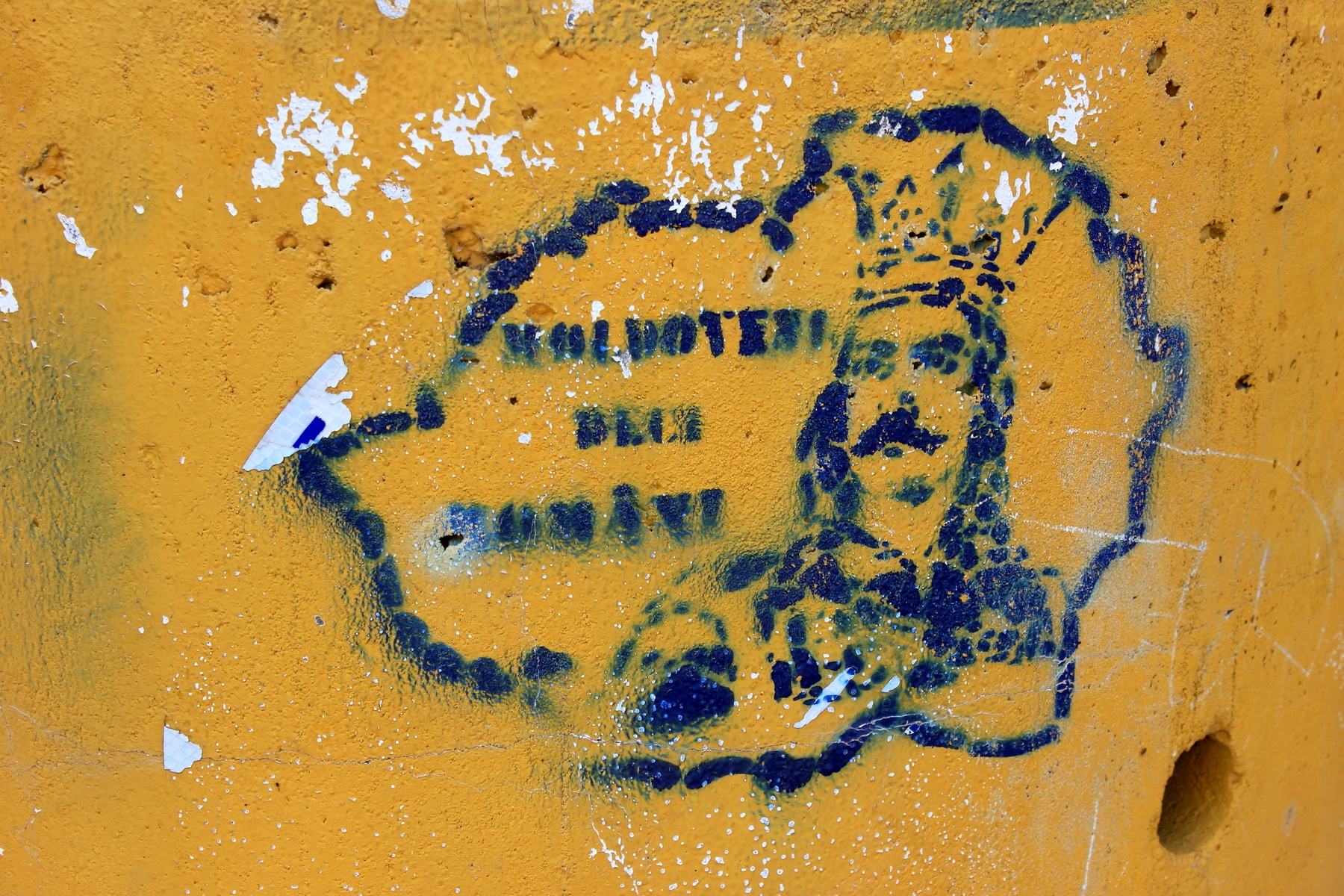 Graffiti mit den Umrissen Großrumäniens an einer Bushaltestelle bei Briceni, Moldawien.